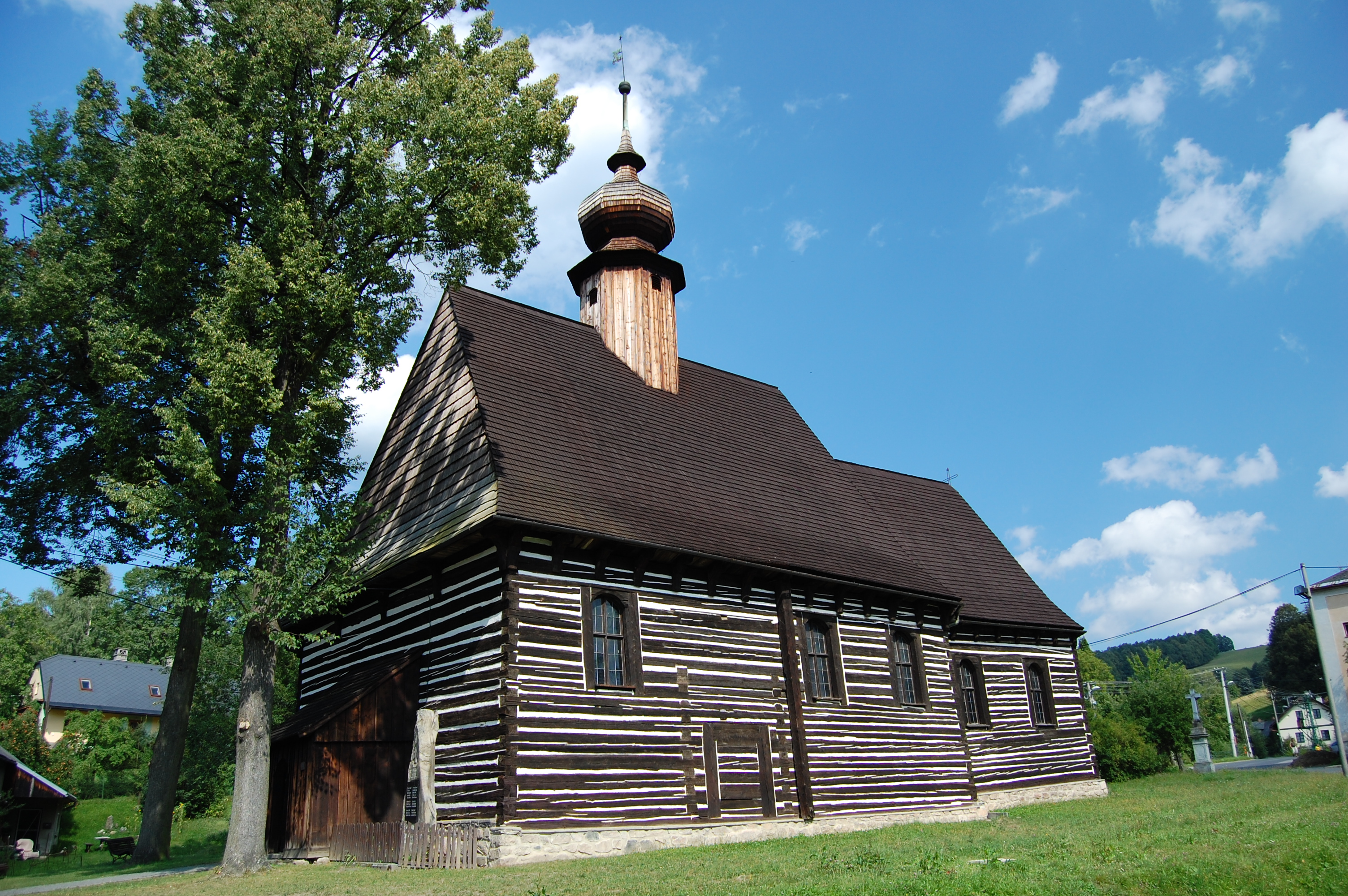 Kostel svatého Michala v Maršíkově - pohled zepředu, Velké Losiny, okres Šumperk